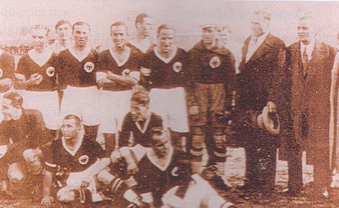 Η ομάδα του ΠΑΟΚ το 1939. Από αριστερά όρθιοι: Γεωργίου, Κρήτας, Βατίκης, Μποστατζόγλου, Ιωαννίδης, Πανίδης, Σωτηριάδης, Π. Κοντόπουλος (έφορος), Μάλτας (ταμίας). Καθιστοί: Σεραφείδης, Απ. Κοντόπουλος, Αρβανίτης, Καλογιάννης